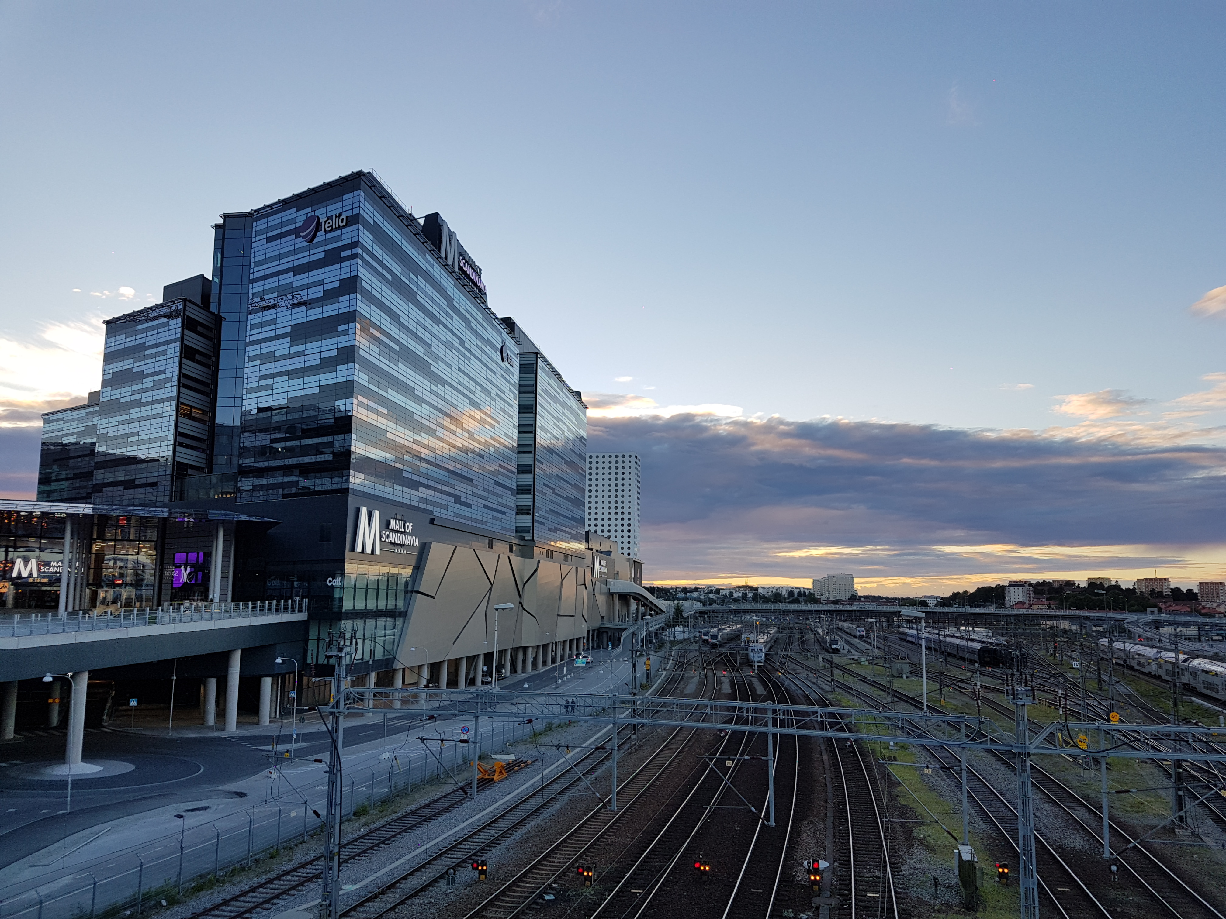 Mall of Scandinavia från gångbron vid Solna station